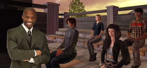 Начало Конференции